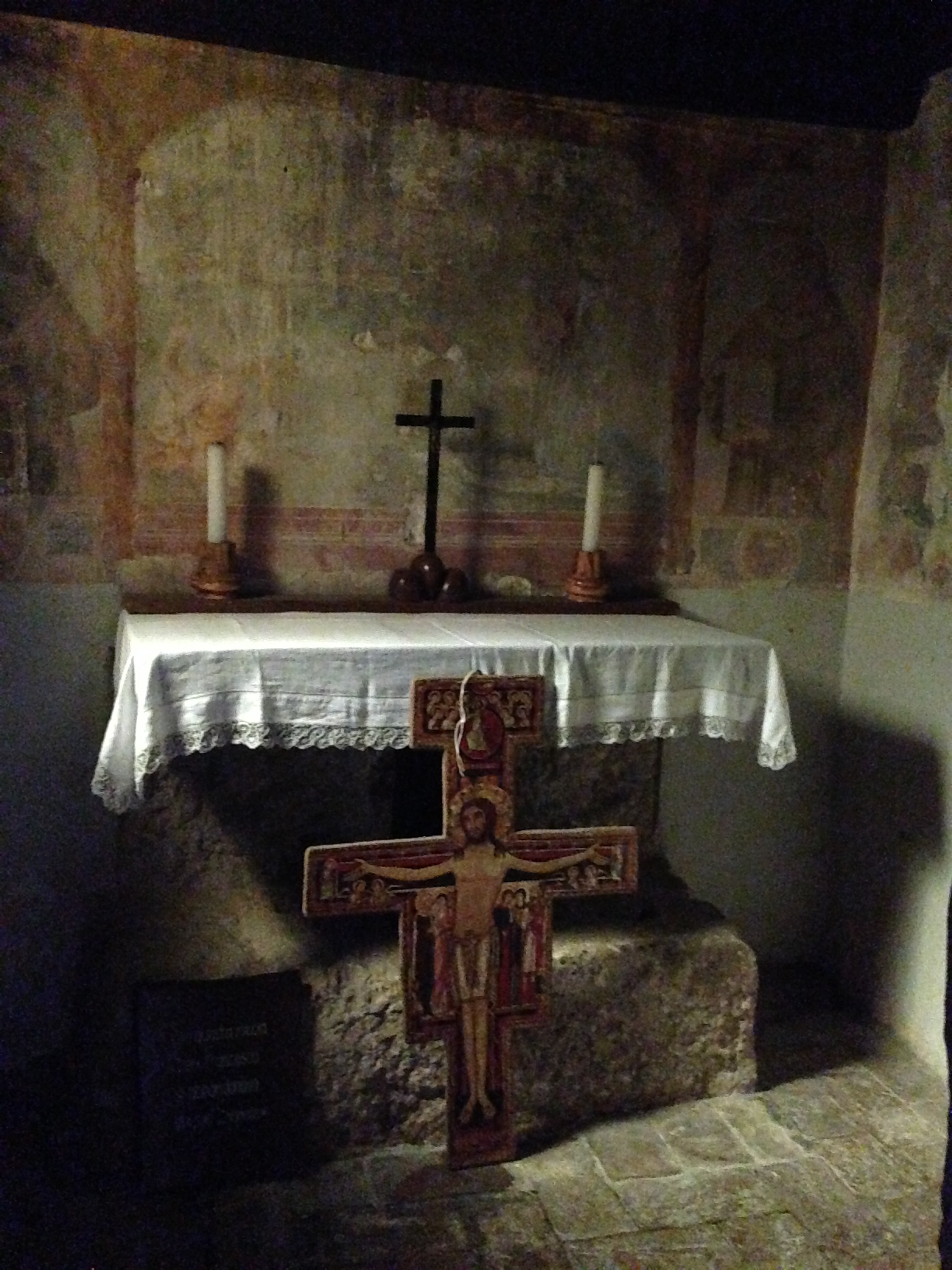 Eremo francescano. Monteluco di Spoleto